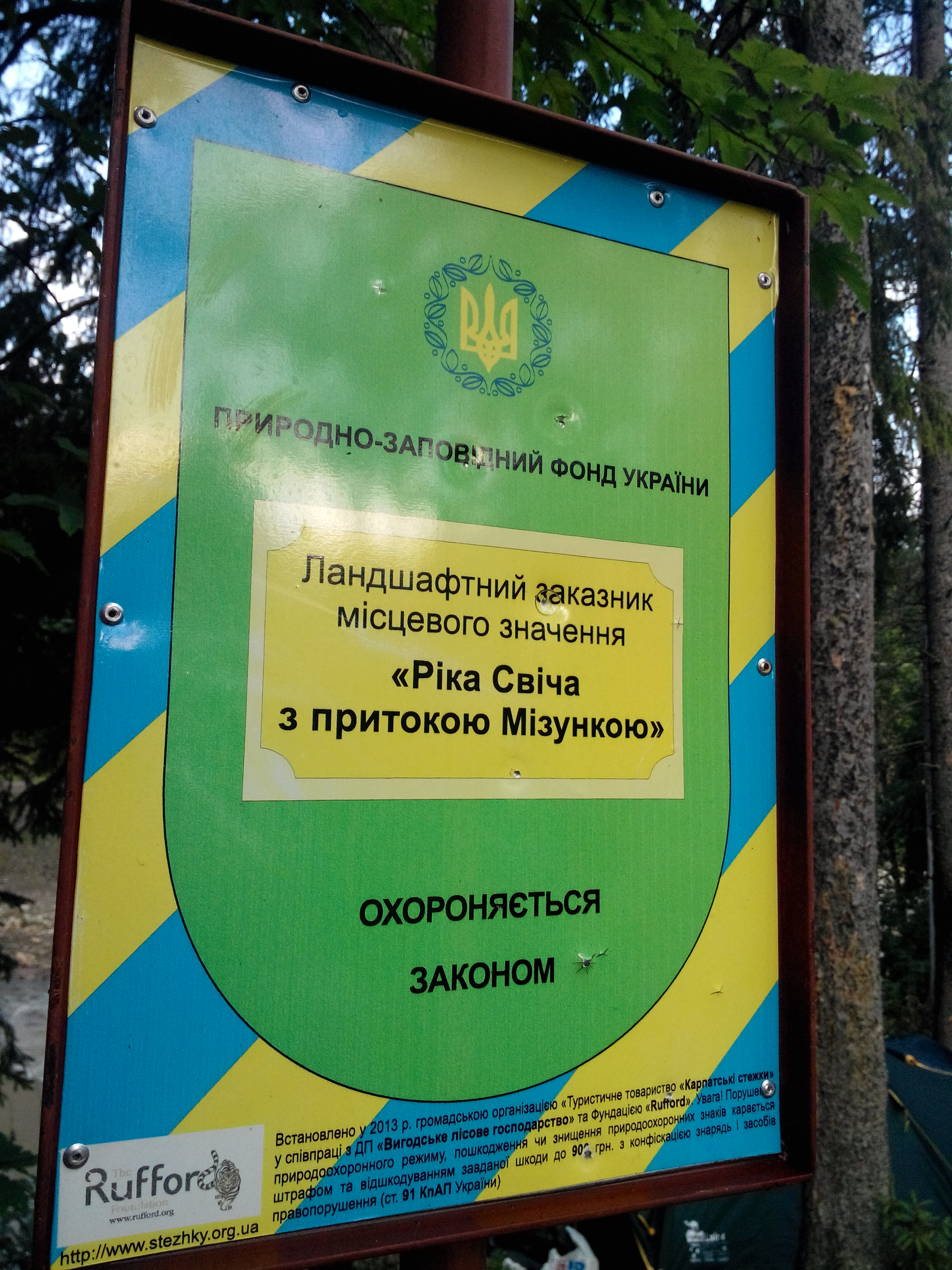 Прострілений браконьєрами охоронний знак